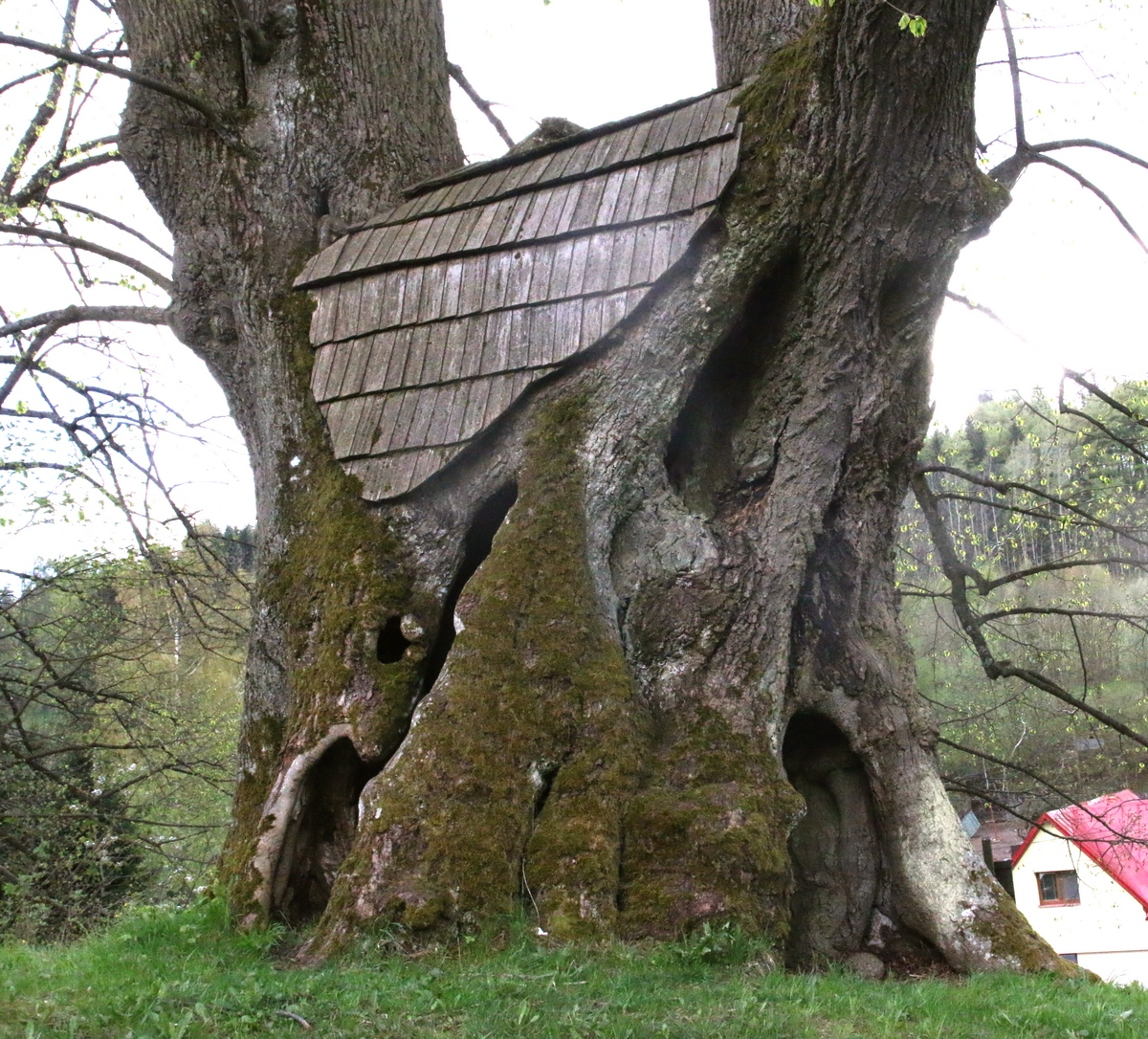 Památná lípa v Sedloňově